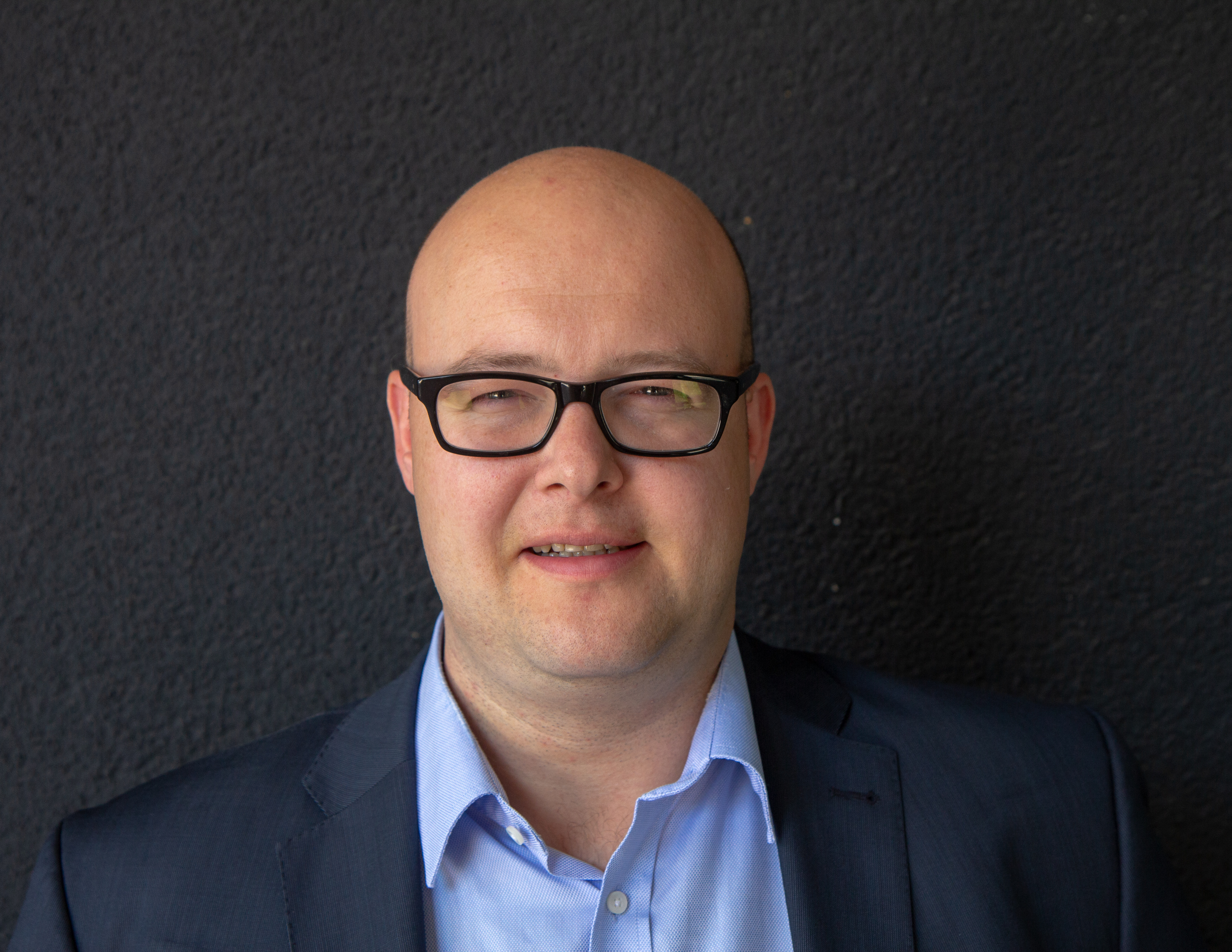 Leonhard Dobusch als Teilnehmer bei der Sitzung des ZDF-Fernsehrat am 29. Juni 2018 in Mainz.